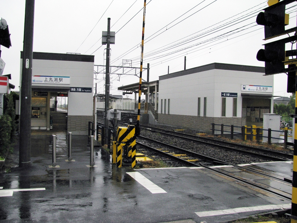 名鉄尾西線上丸渕駅